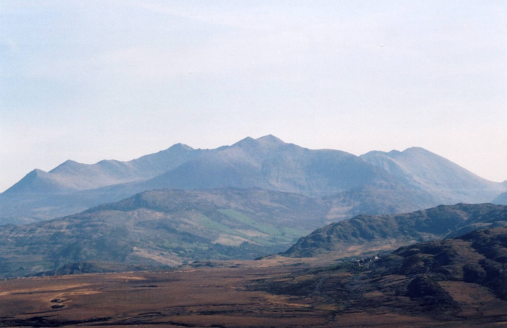 ligne de crête du massif montagneux